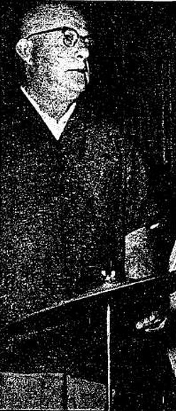 ישראל סגל מנגן בתופים ובמצלתיים